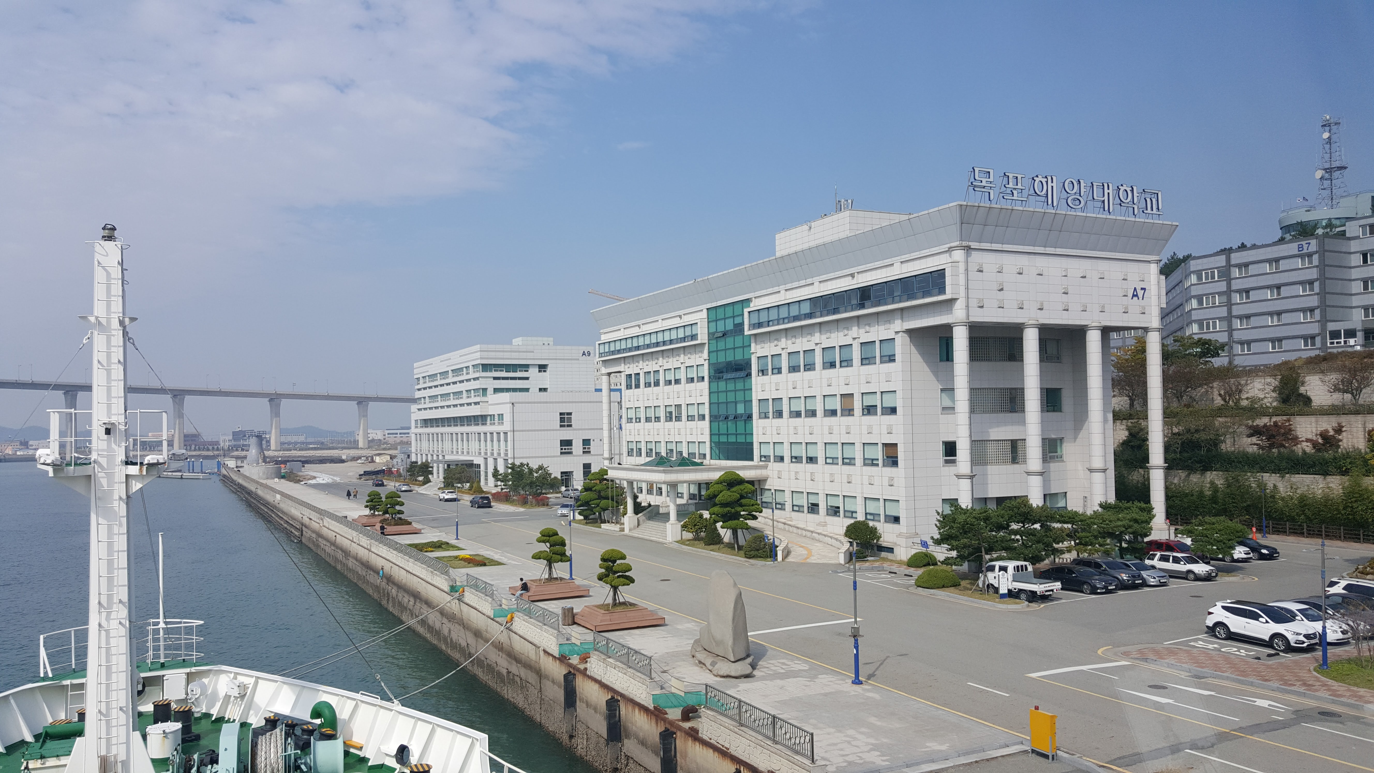 국립목포해양대 본관